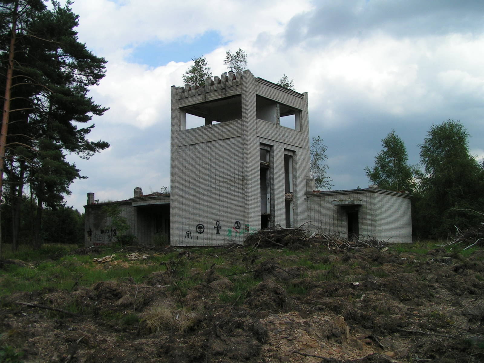 Pozůstatky po sovětské armádě ve vojenském prostoru Ralsko, okres Česká Lípa, Czech Republic Jiří Vackář 20:45, 15 May 2006 (UTC)